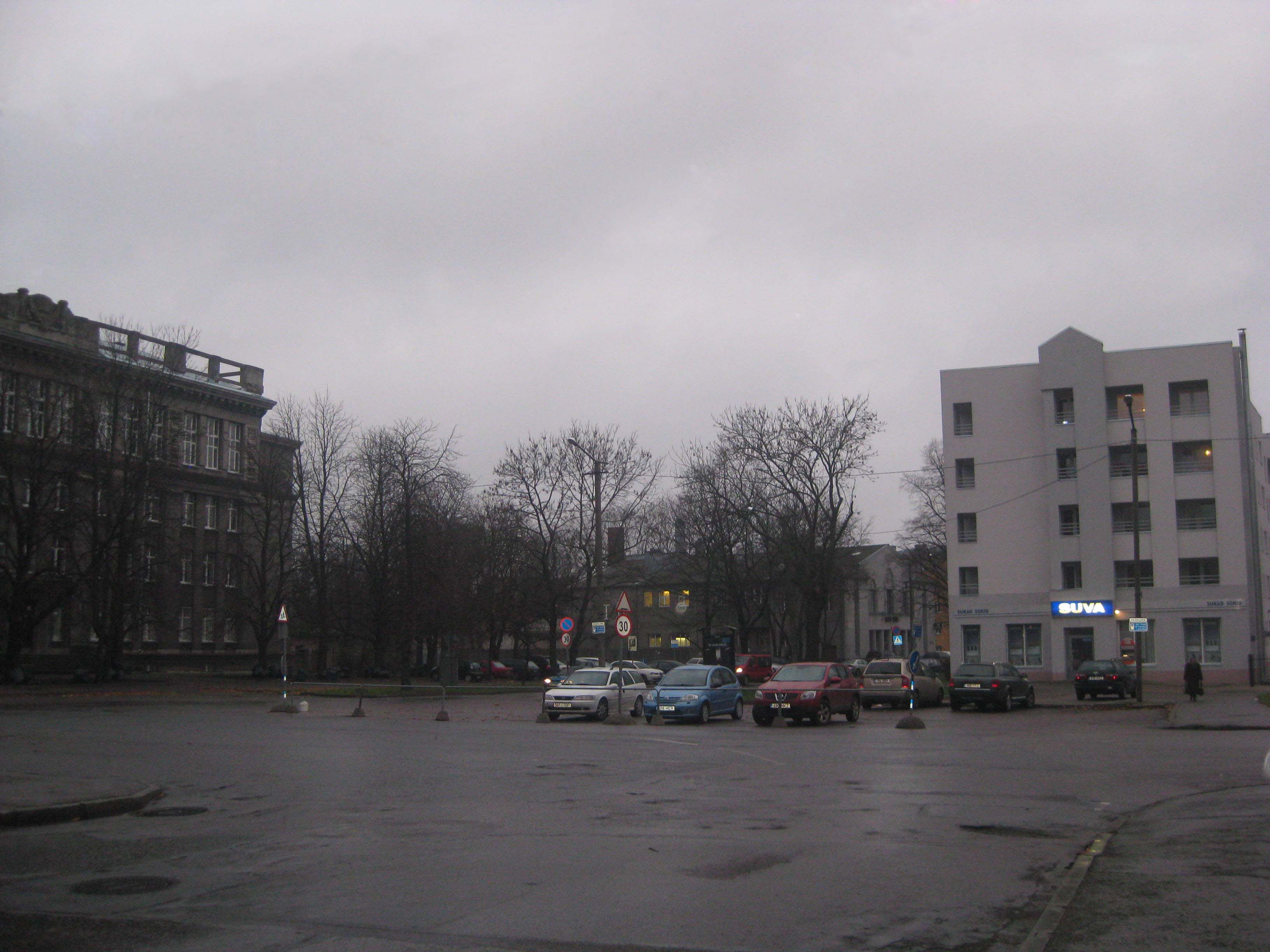 Каламая, Таллин